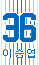 이승엽